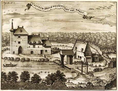 Château de Trois-Fontaines (Auderghem) en 1532. Gravure de Jacques Harrewyn (1660-1727) d'après un carton de L. Vorstermans jr. de 1659.